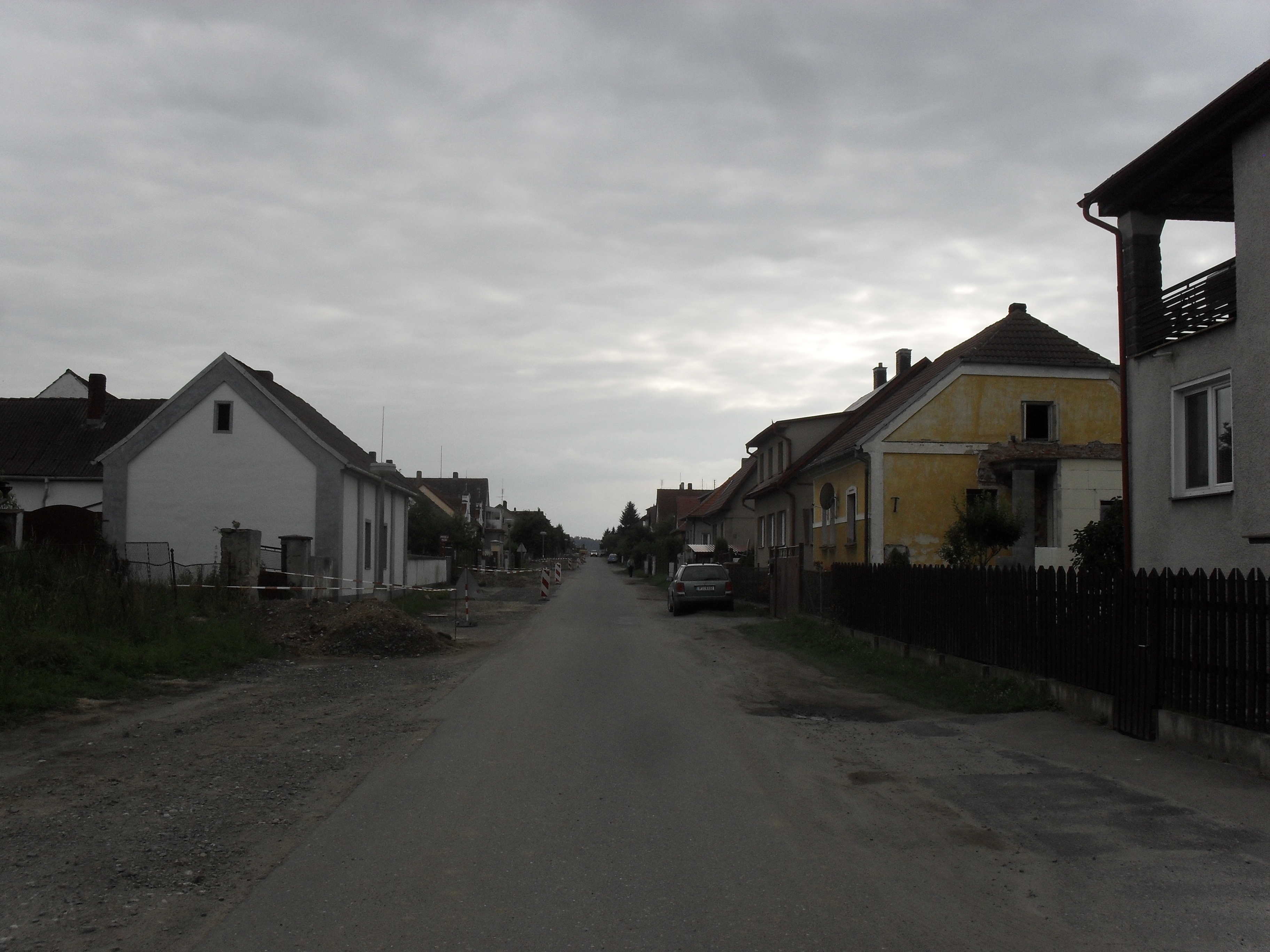 Fotografie Horažďovického předměstí.